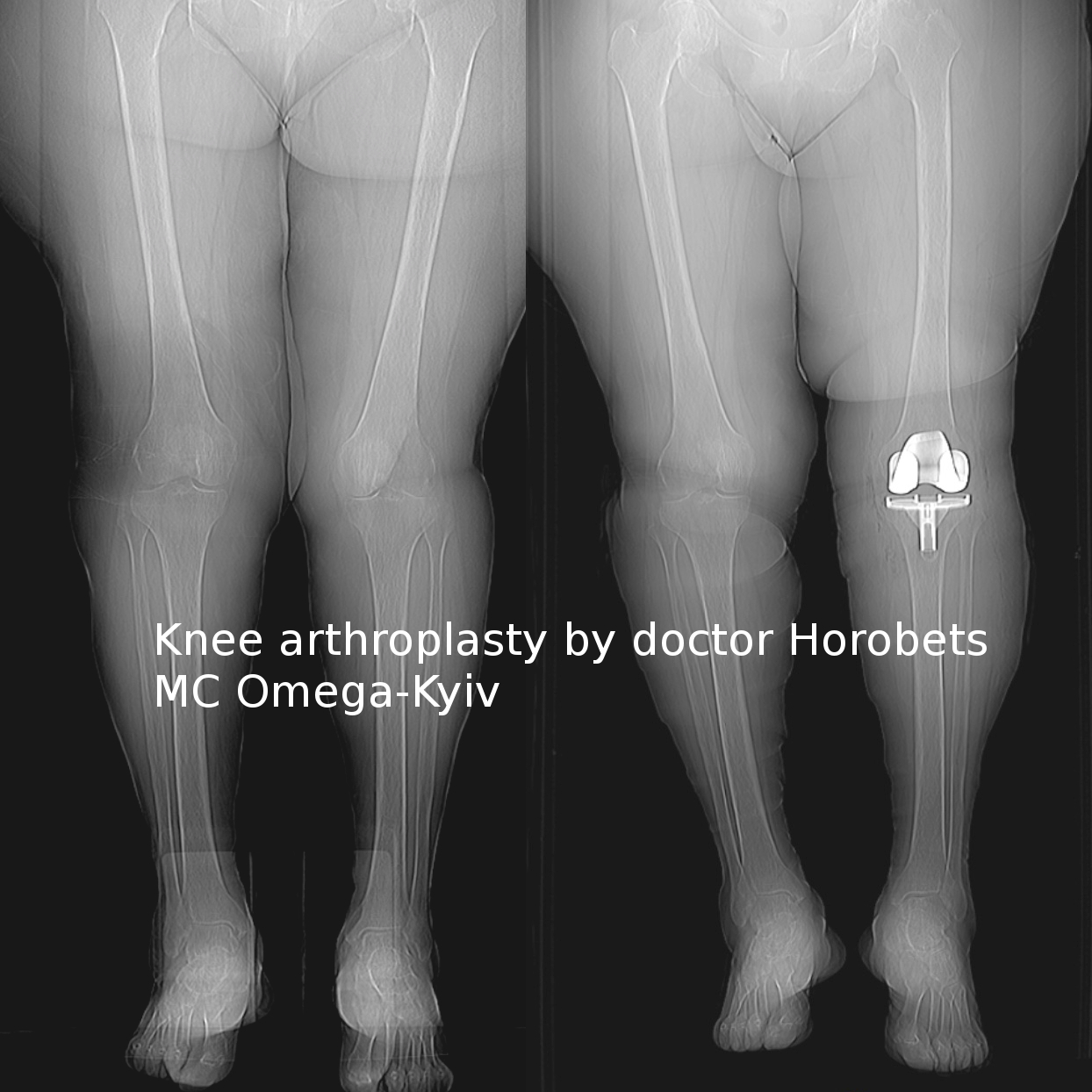 Ендопротезування колінного суглобу, лікар Горобець